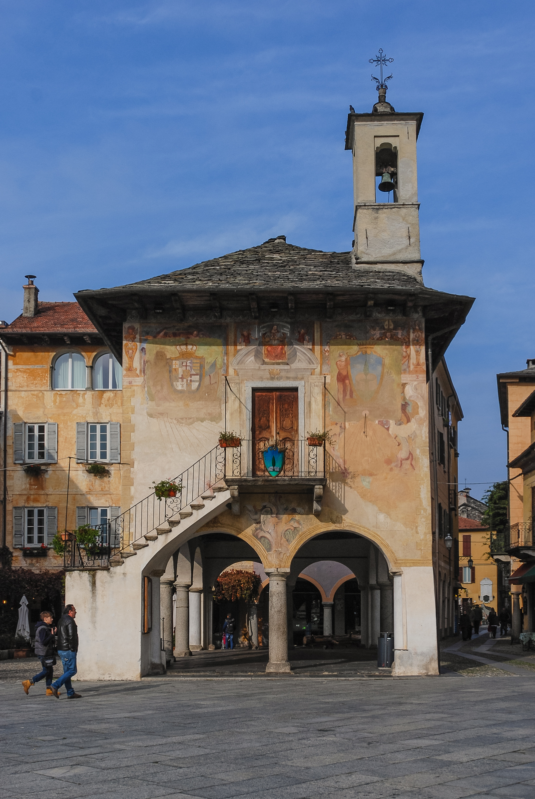 Palazzo dell'Università della Riviera This is a photo of a monument which is part of cultural heritage of Italy.